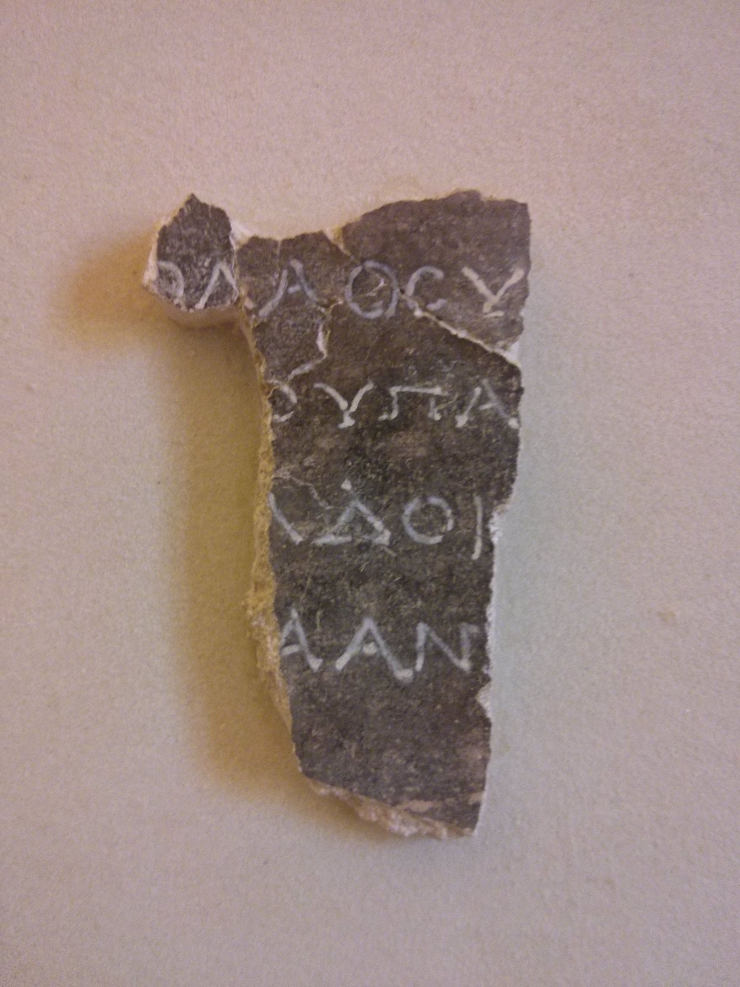 Frammento di affresco con epigramma (Anth. Gr. VI 110) di Leonida di Taranto, dal Foro di Suasa